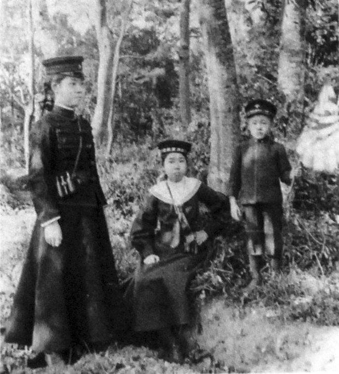 明治天皇の皇女・昌子内親王（右）と房子内親王（左）。女性用の軍服を着ている。